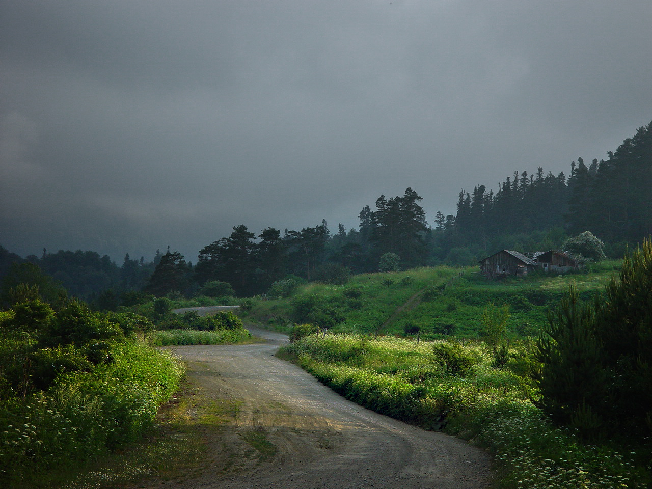 Bolu Landscape